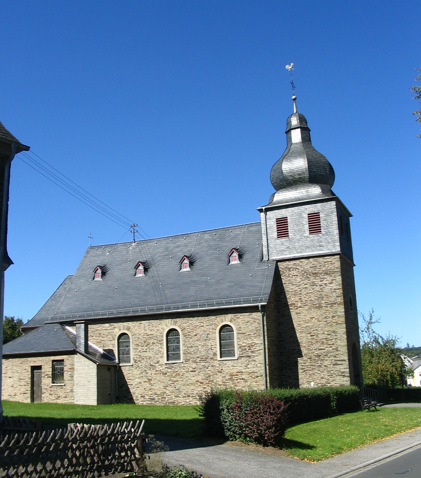 Kirche in Reckershausen